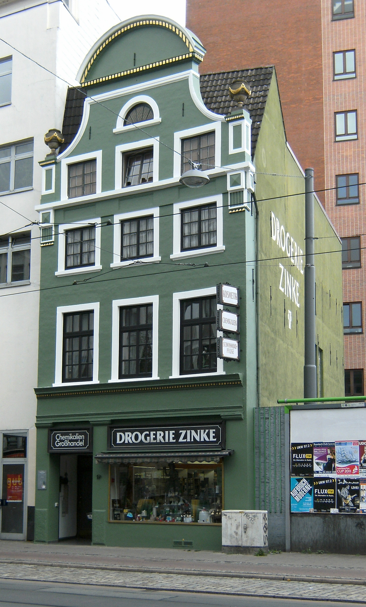 Drogerie Zinke in Bremen, Faulenstraße 17.Das abgebildete Objekt ist ein geschütztes Kulturdenkmal in der Freien Hansestadt Bremen, mit der Nr. 0328 beim Landesamt für Denkmalpflege registriert.